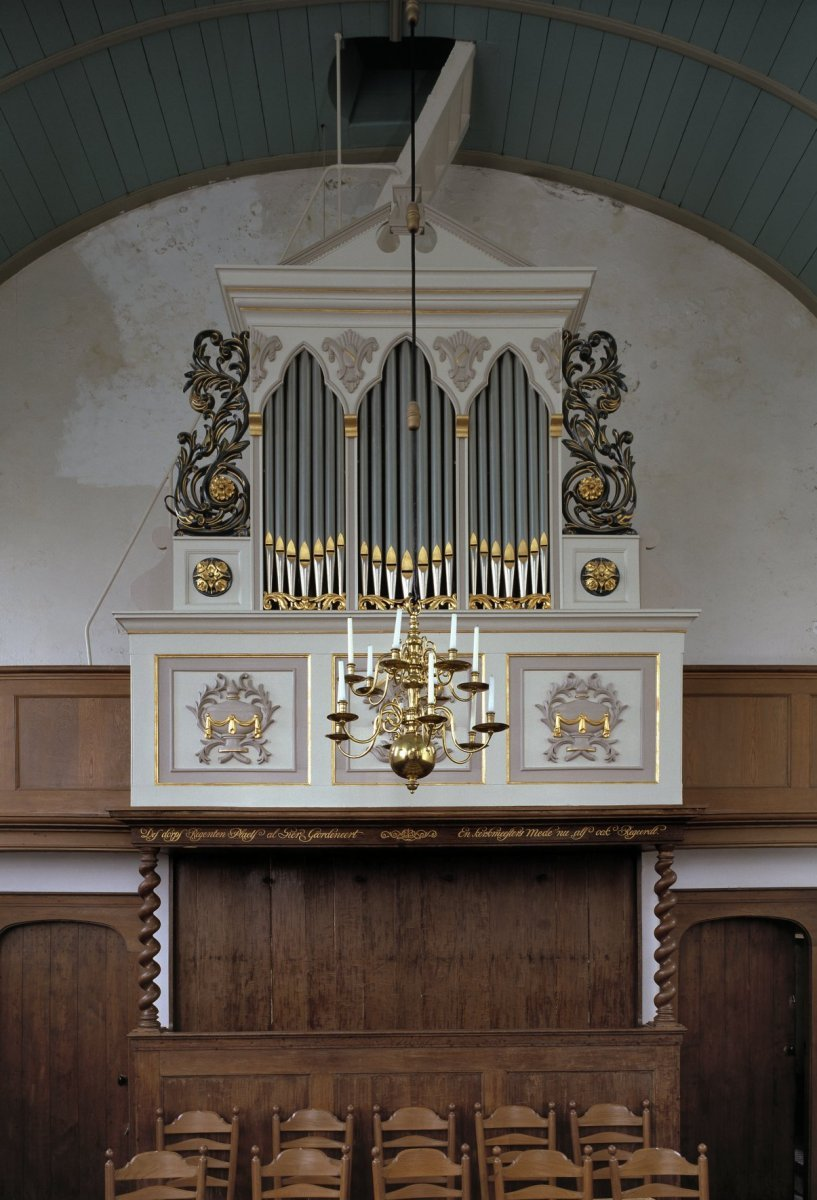 Nederlands Hervormde Kerk: Interieur, aanzicht orgel, orgelnummer 818 (opmerking: Gefotografeerd voor Het Historische Orgel in Nederland 1858-1865)